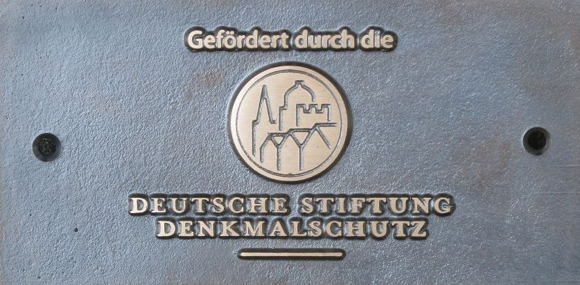 Plakette der Deutschen Stiftung Denkmalschutz an Förderprojekten